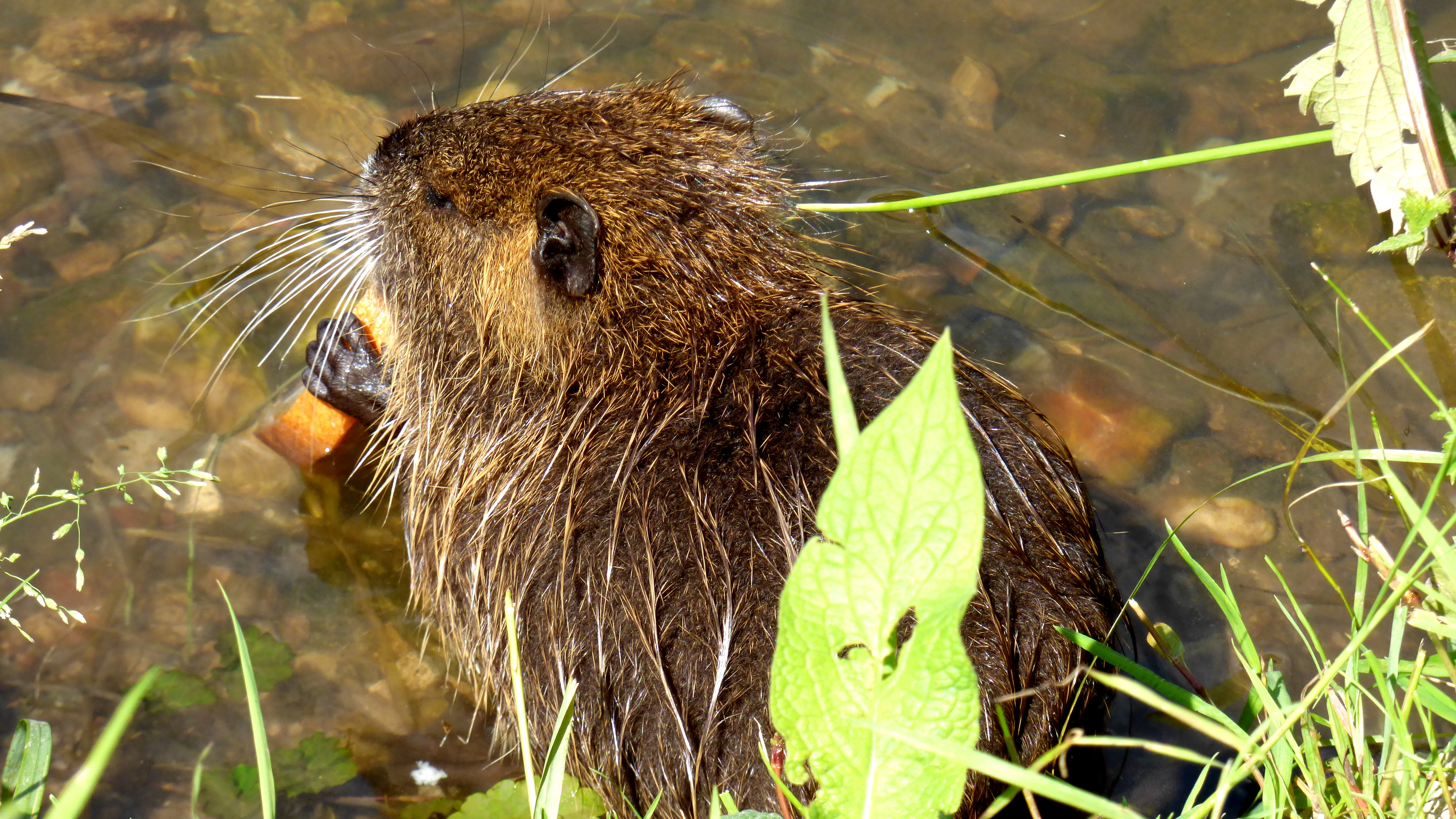 Ohře ve Volenicích